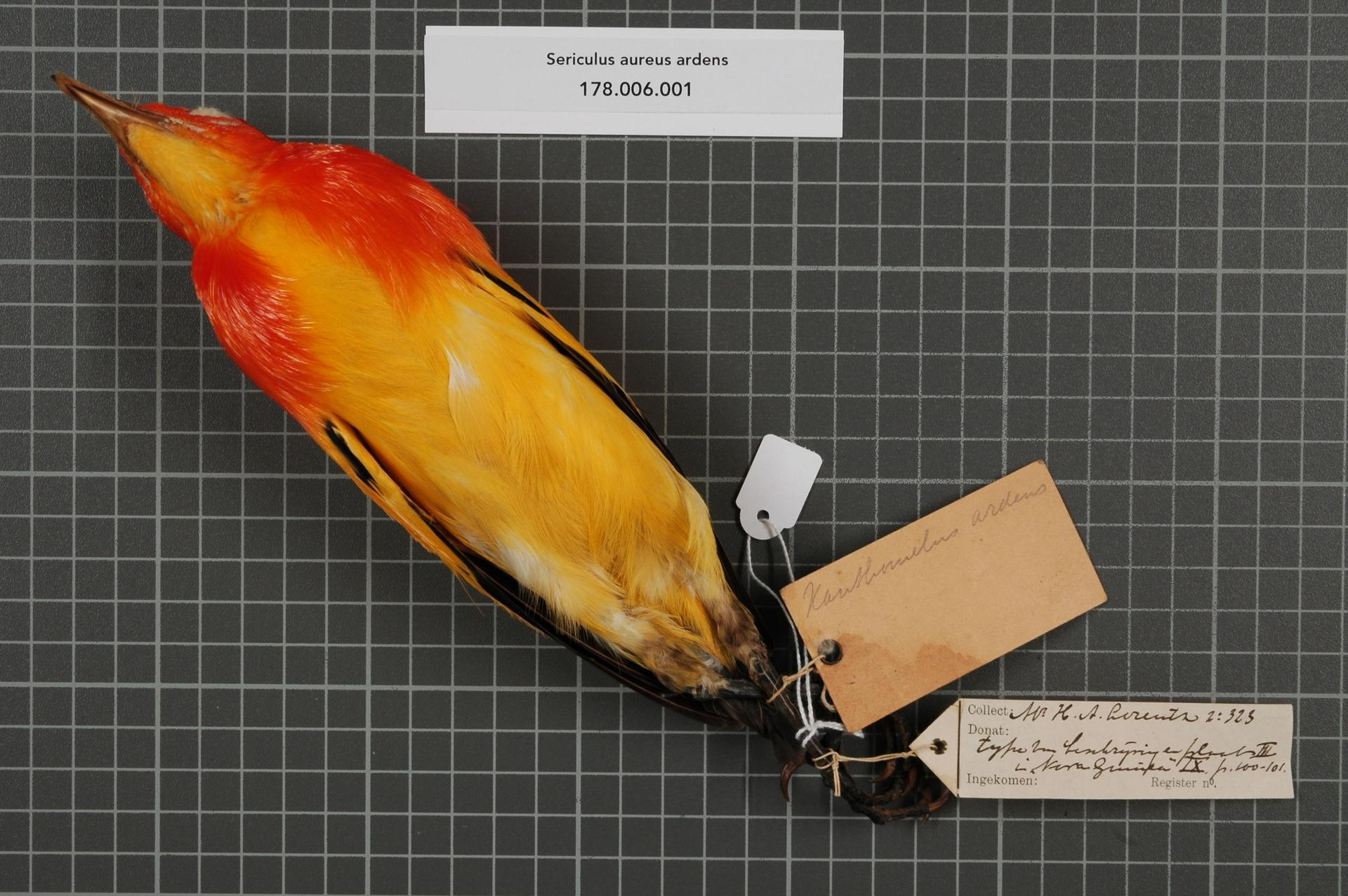 Sericulus aureus ardens (D'Albertis & Salvadori, 1879)